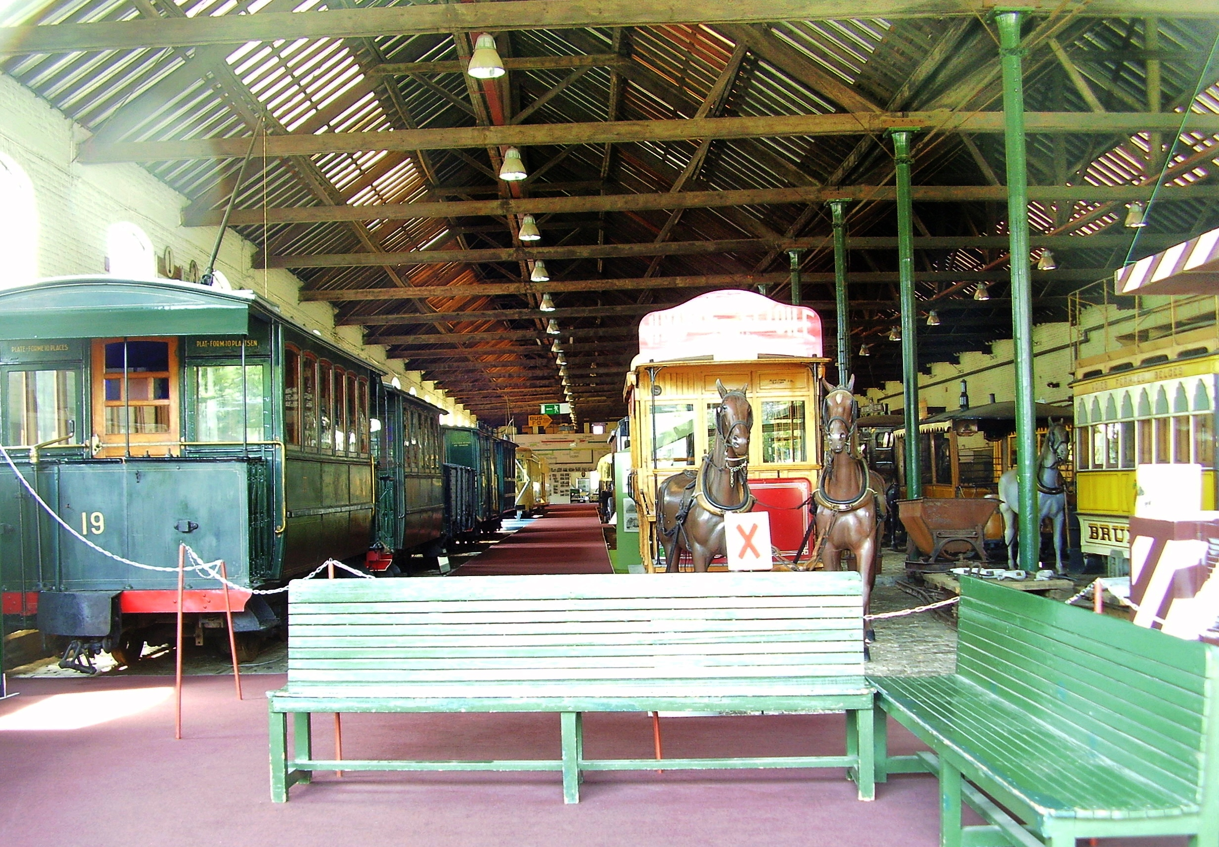 Description: Musée du tram bruxellois, Woluwe-Saint-Pierre (Bruxelles) Author: User:Ben2 Date of creation: 29 juin 2006 Source: Photo personnelle